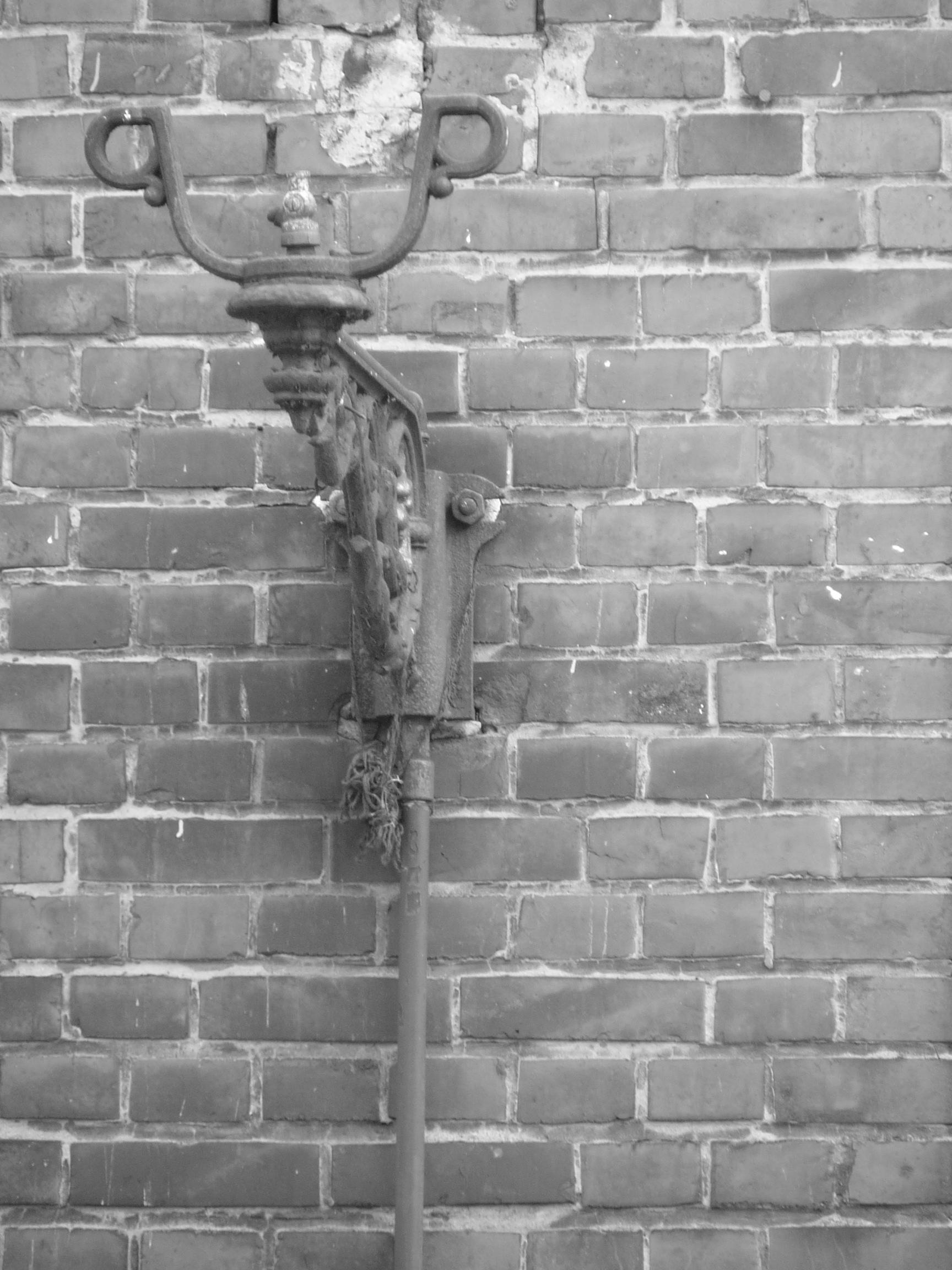 Die vermutlich letzte Gaslaterne in Gleiwitz. Sie befindet sich auf der Wand einer Schule in Gleiwitz-Laband.